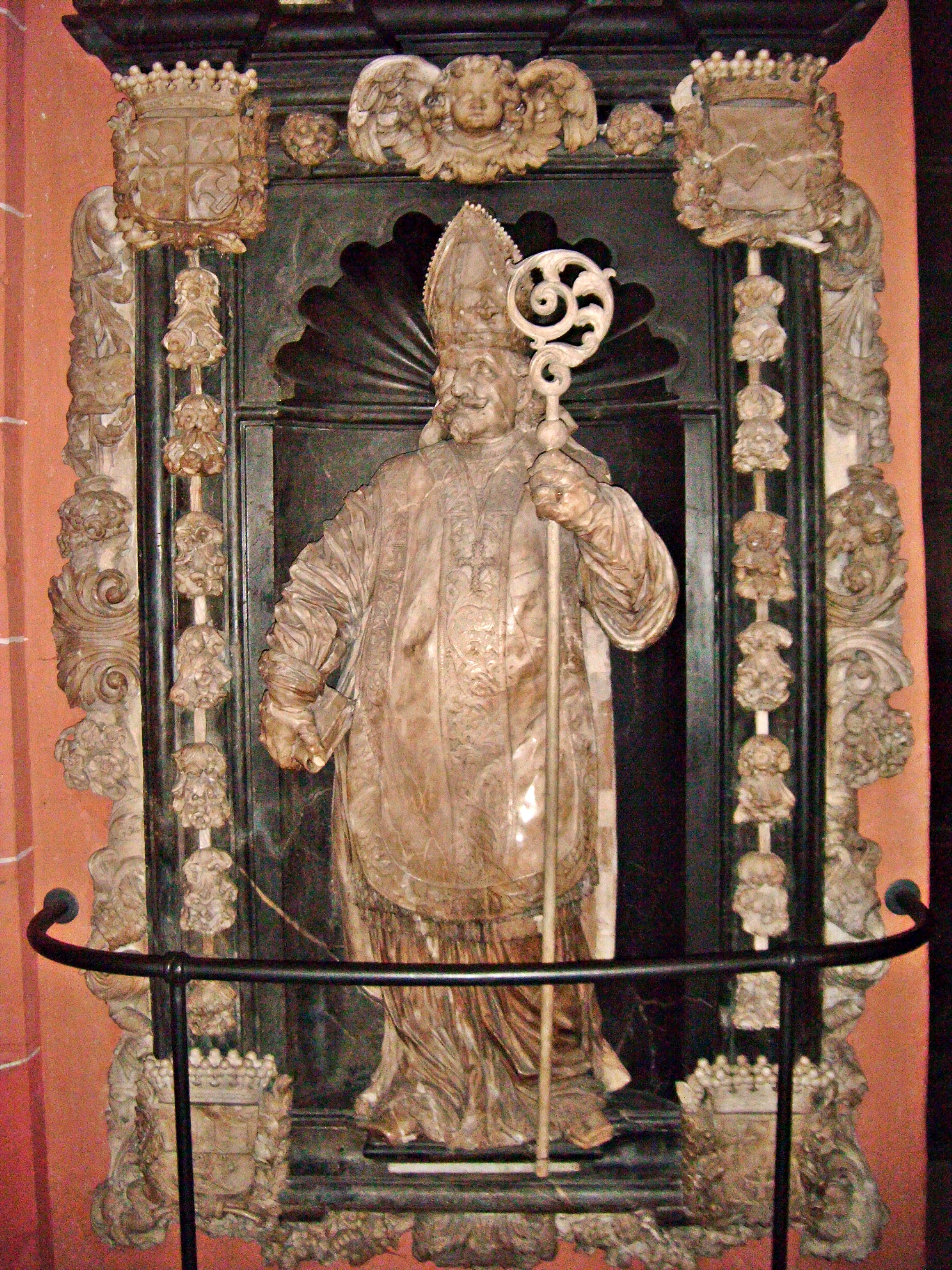 Grabmal des Wormser Bischofs Johann Karl von und zu Franckenstein (1610-1691), im Dom zu Frankfurt